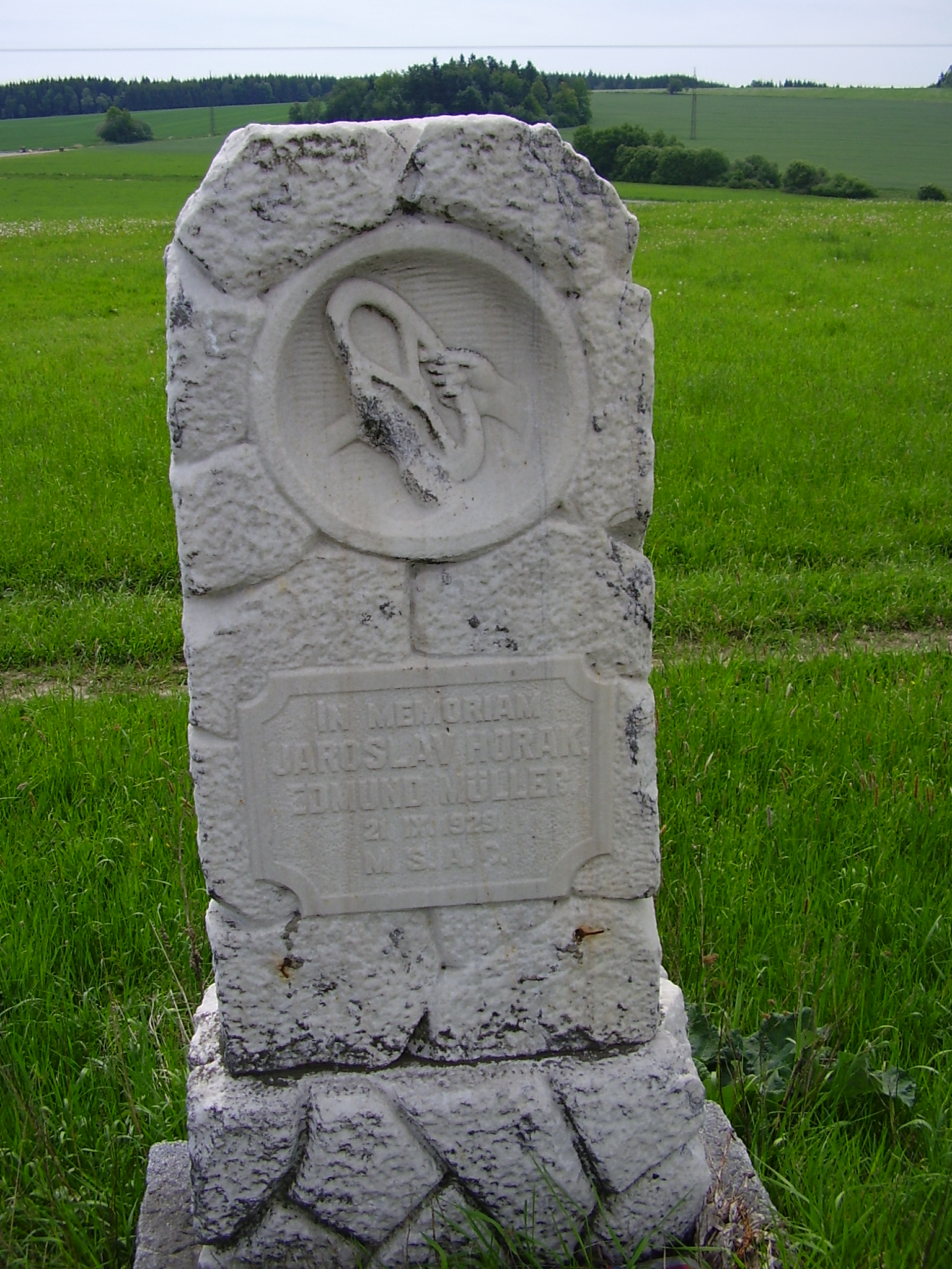 Gedenkstein im Zielbereich des Ecce-Homo-Bergrennens